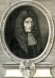 Heinrich Bacmeister (1618-1692), Kammerprokurator